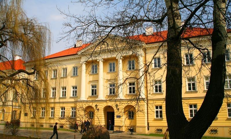 Warszawa (Polska)